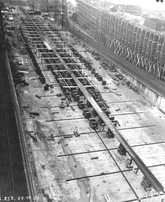 Flugzeugträger "A". Baustadium v. 28.12.1936 Deutsche Werke Kiel